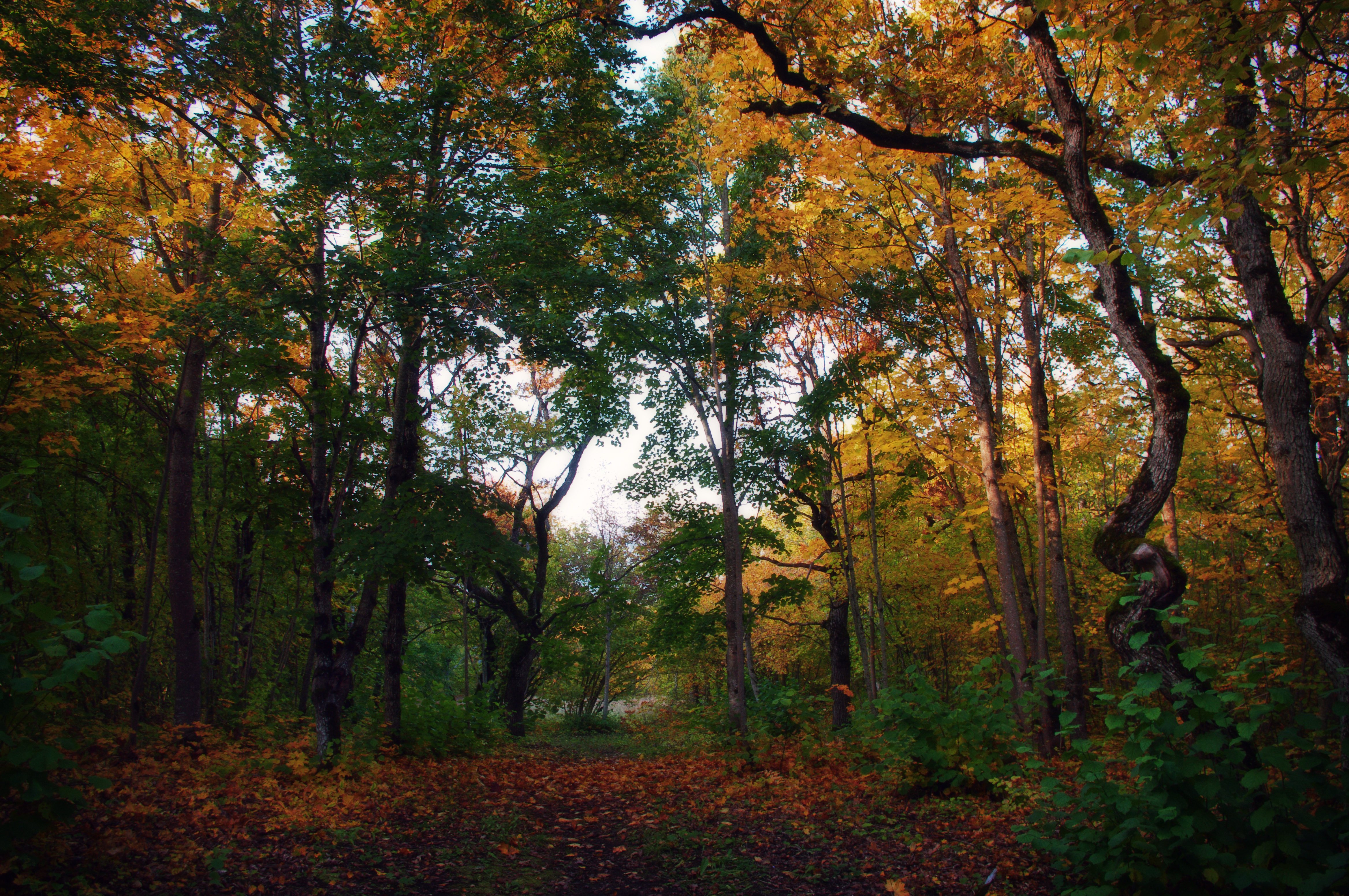 Rakvere tammik, Rakvere tammiku MKA